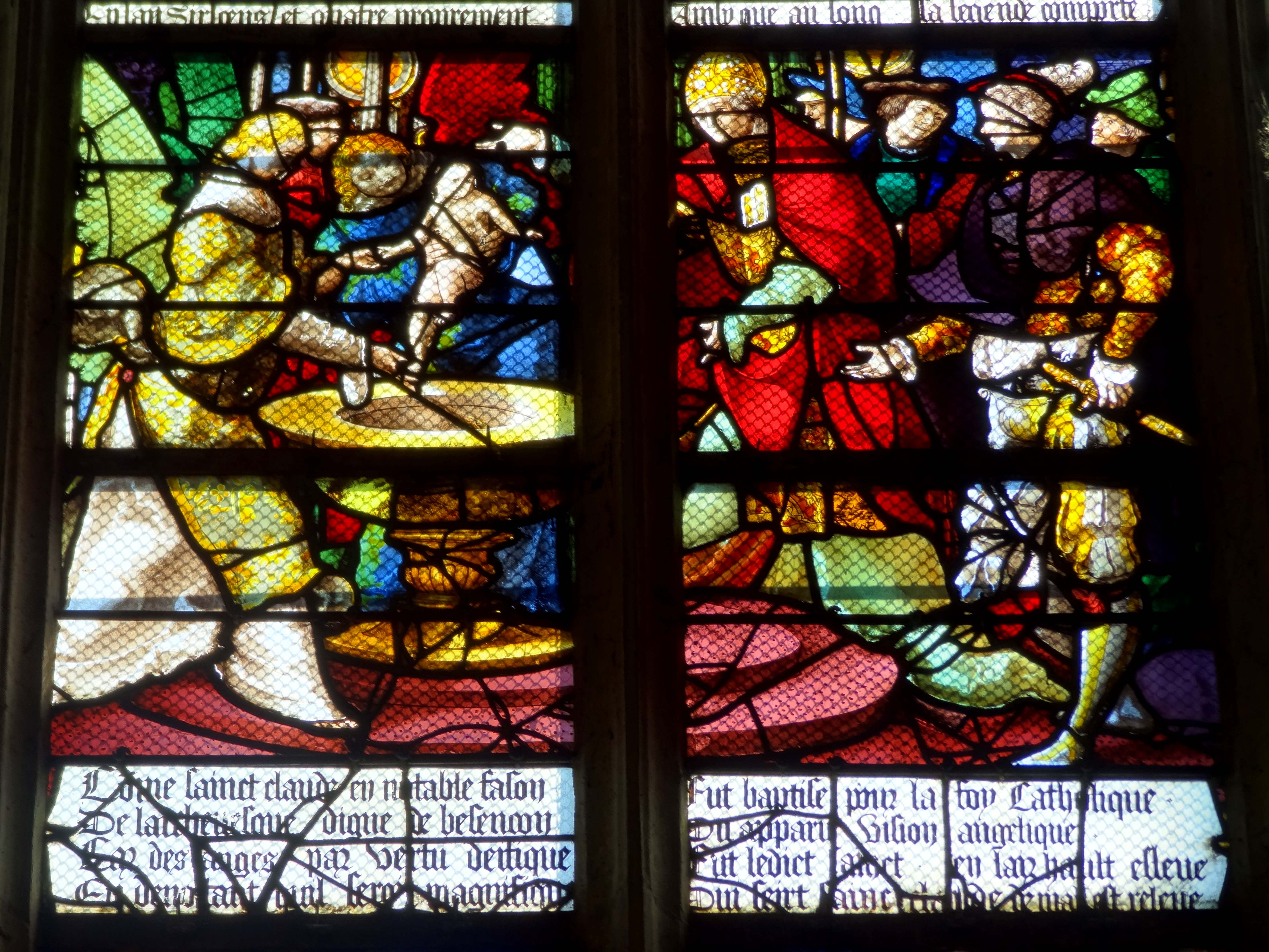 Vitraux Renaissance - voir titre.